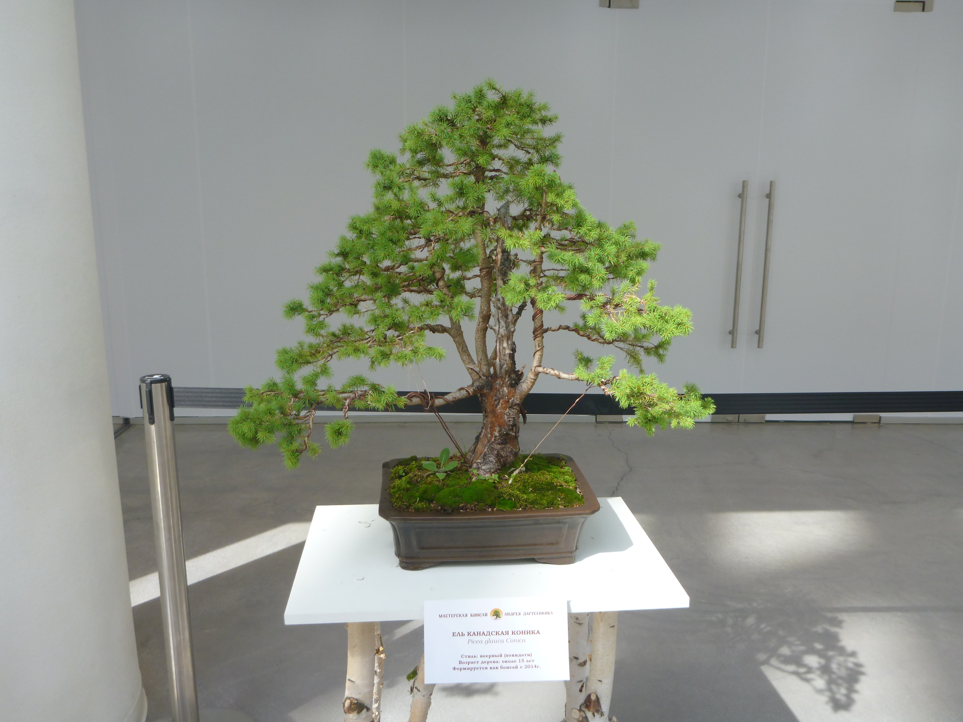 Ель канадская коника бонсай в Ельцин-центре 2019 год